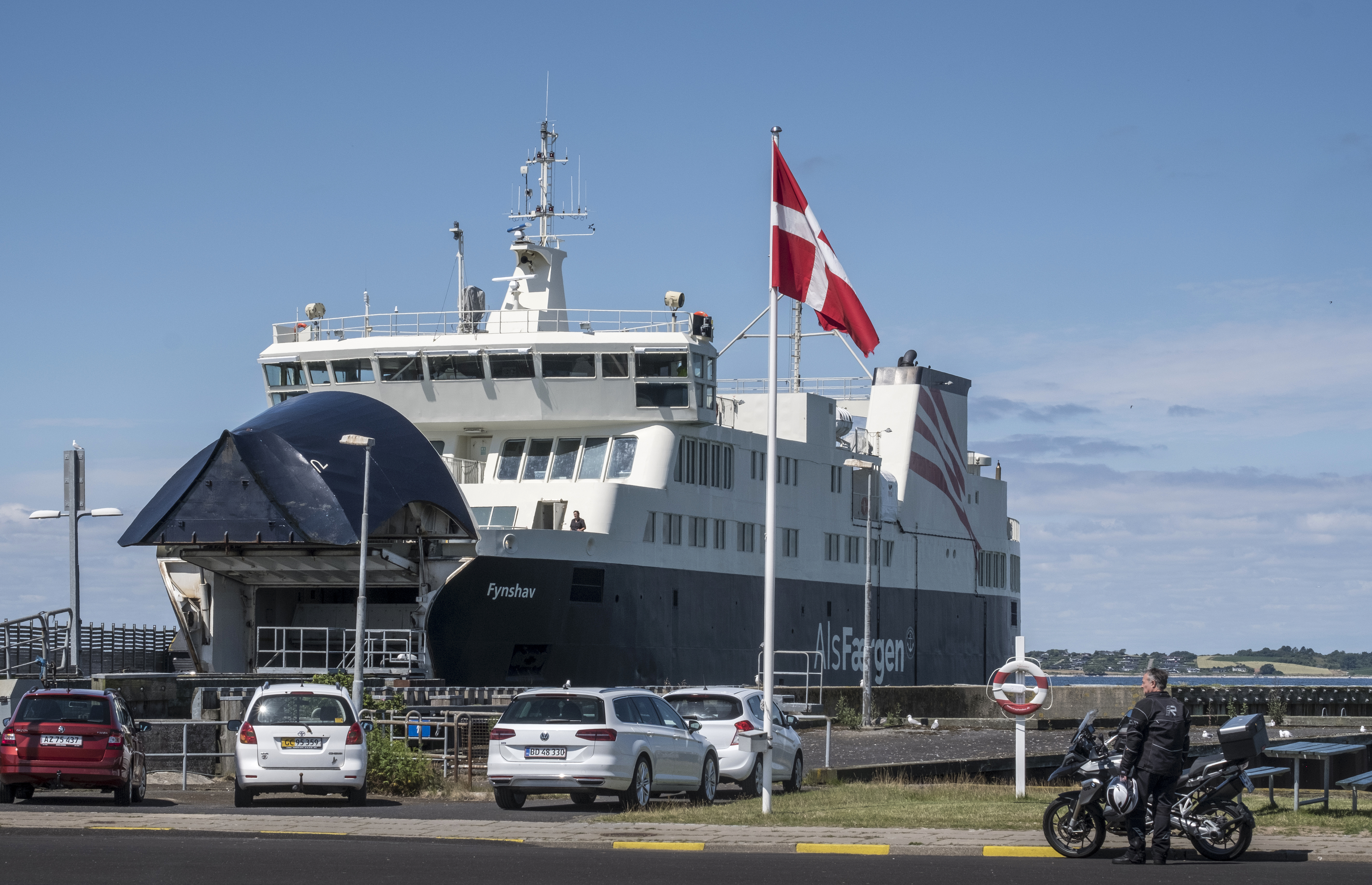 AlsFærgen Fynshav ved havnen i Bøjden. Alsfærgen sejler mellem Fynshav på Als og Bøjden på Fyn..Photo: News Øresund - Johan Wessman.© News Øresund - Johan Wessman (CC BY 3.0).. .Detta verk av News Øresund är licensierat under en Creative Commons Erkännande 3.0 Unported-licens (CC BY 3.0). Bilden får fritt publiceras under förutsättning att källa anges. .The picture can be used freely under the prerequisite that the source is given. News Øresund, Malmö, Sweden.News Øresund är en oberoende regional nyhetsbyrå som är en del av det oberoende dansk-svenska kunskapscentrat Øresundsinstituttet...